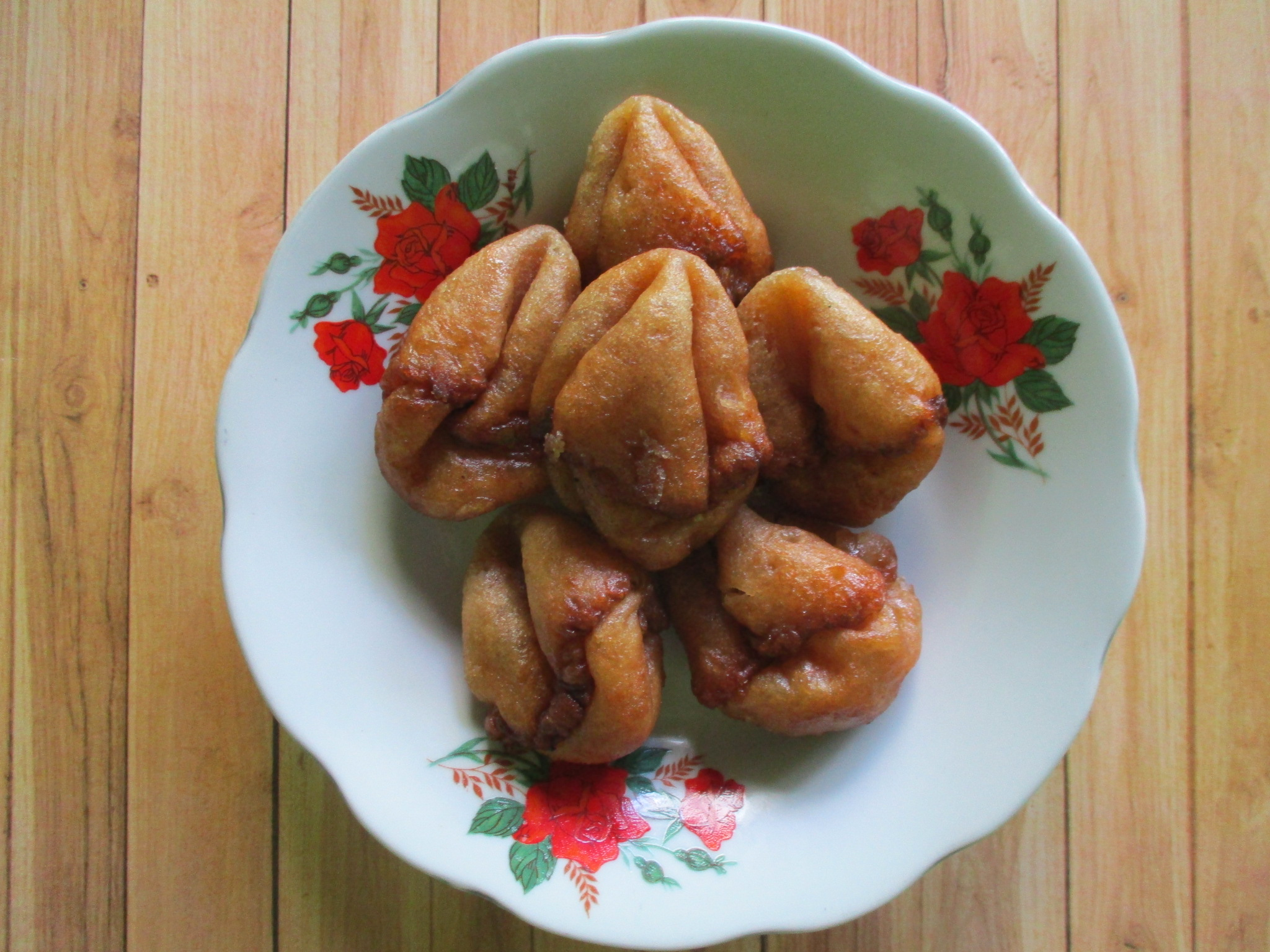 Jawa: Kue Adrem iku sawijining panganan kang mligi saka Bantul. Biasané panganan iki diladhi nalika upacara temanten, lan disguhaké marang dayoh. Panganan iki digawé saka tepung lan bahan-bahan liyané.